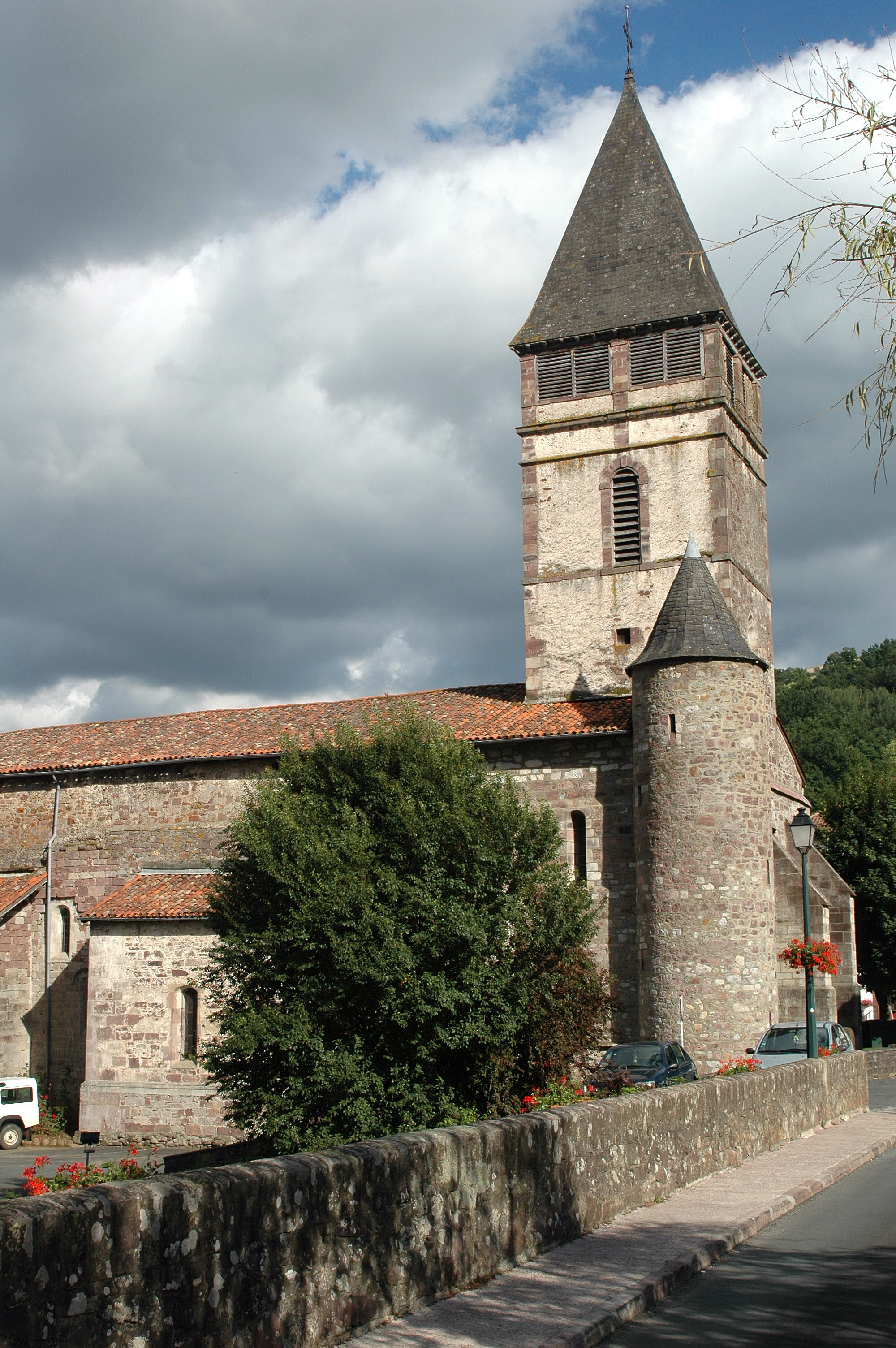 Saint-Étienne-de-Baïgorry, église Saint-Etienne. Photo prise le 03/08/06 par Harrieta171